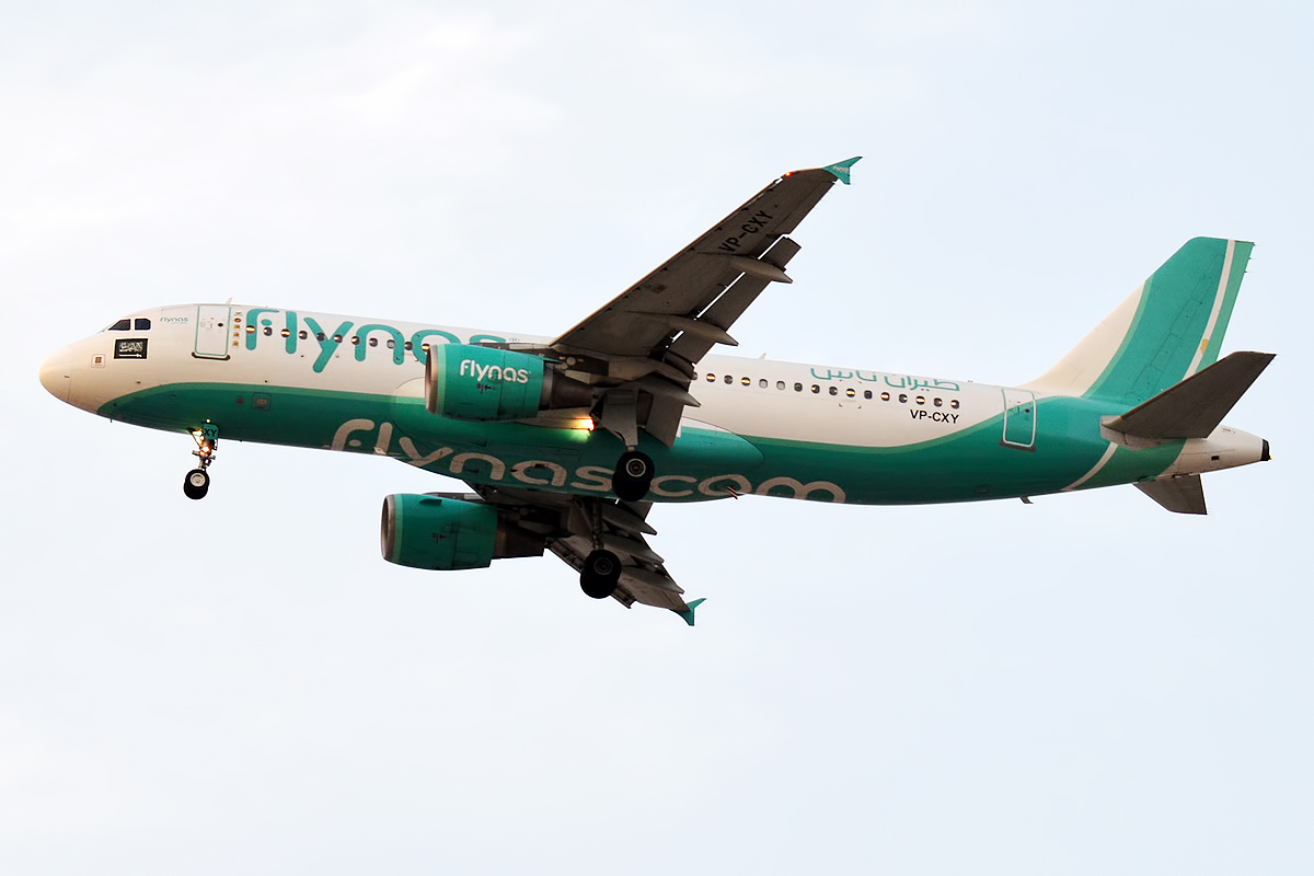 Flynas, VP-CXY, Airbus A320-214